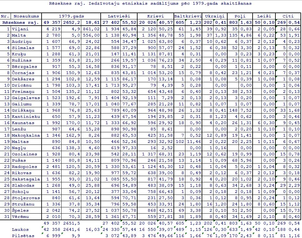 Latvijas 1979. gada tautas skaitīšanas dati